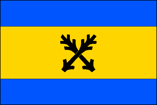 Vlajka města Zákupy